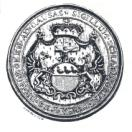 Het gemeentezegel van Hoboken